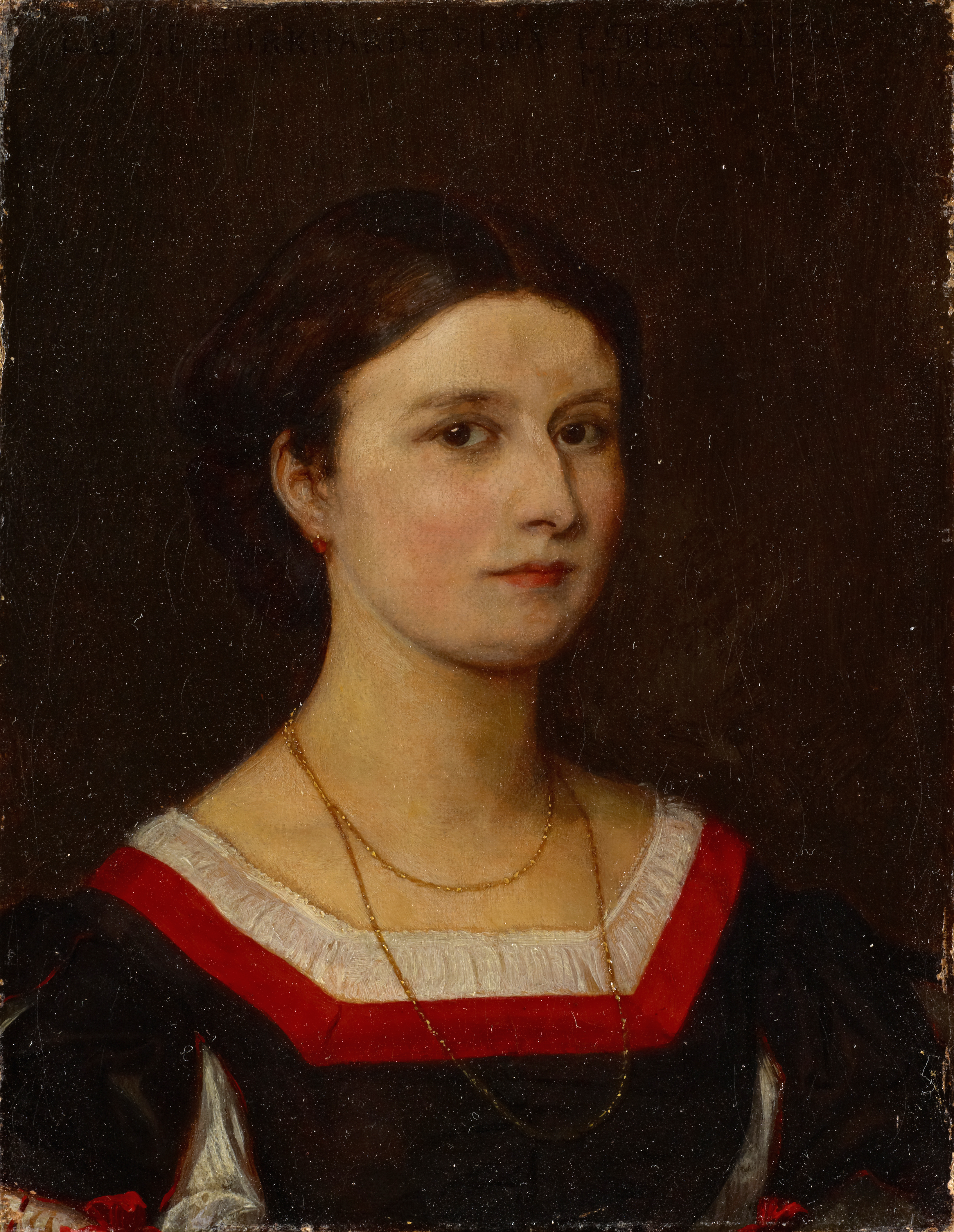 Bezeichnet, signiert und datiert oben: LUISE BURKHARDT PINX. E.STÜCKELBERG. / MDCCCLXV